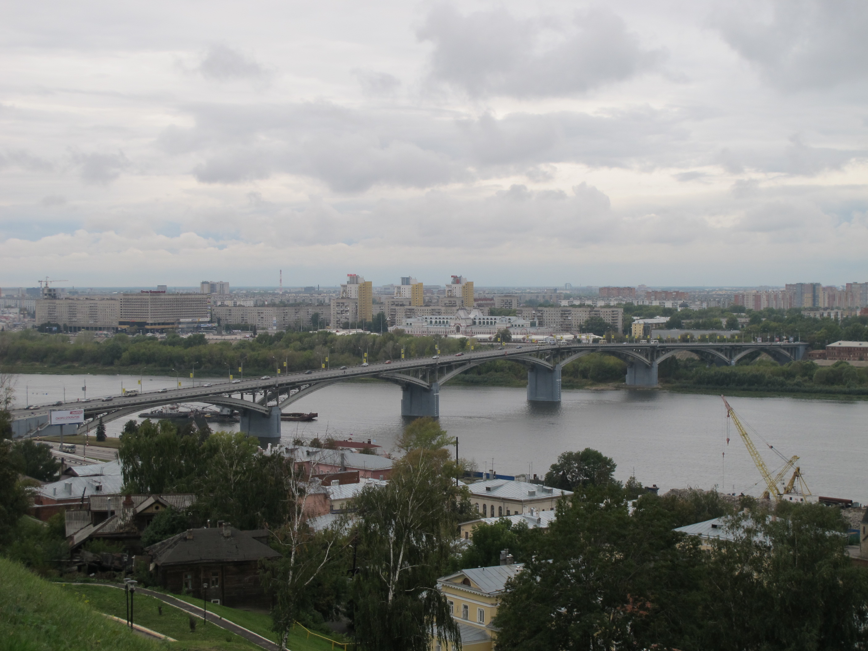 Канавинский мост, Нижний Новгород